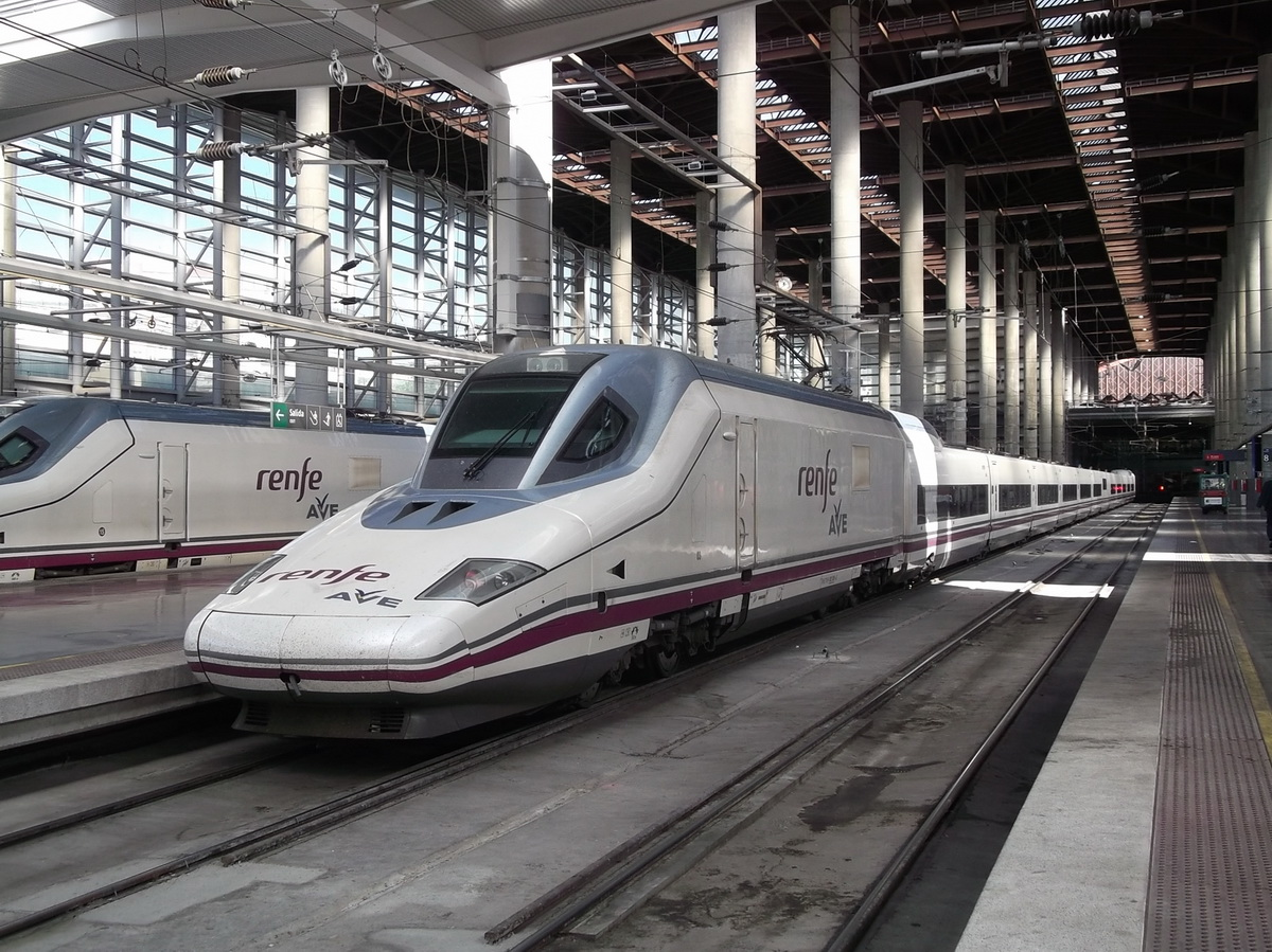 Серия 102